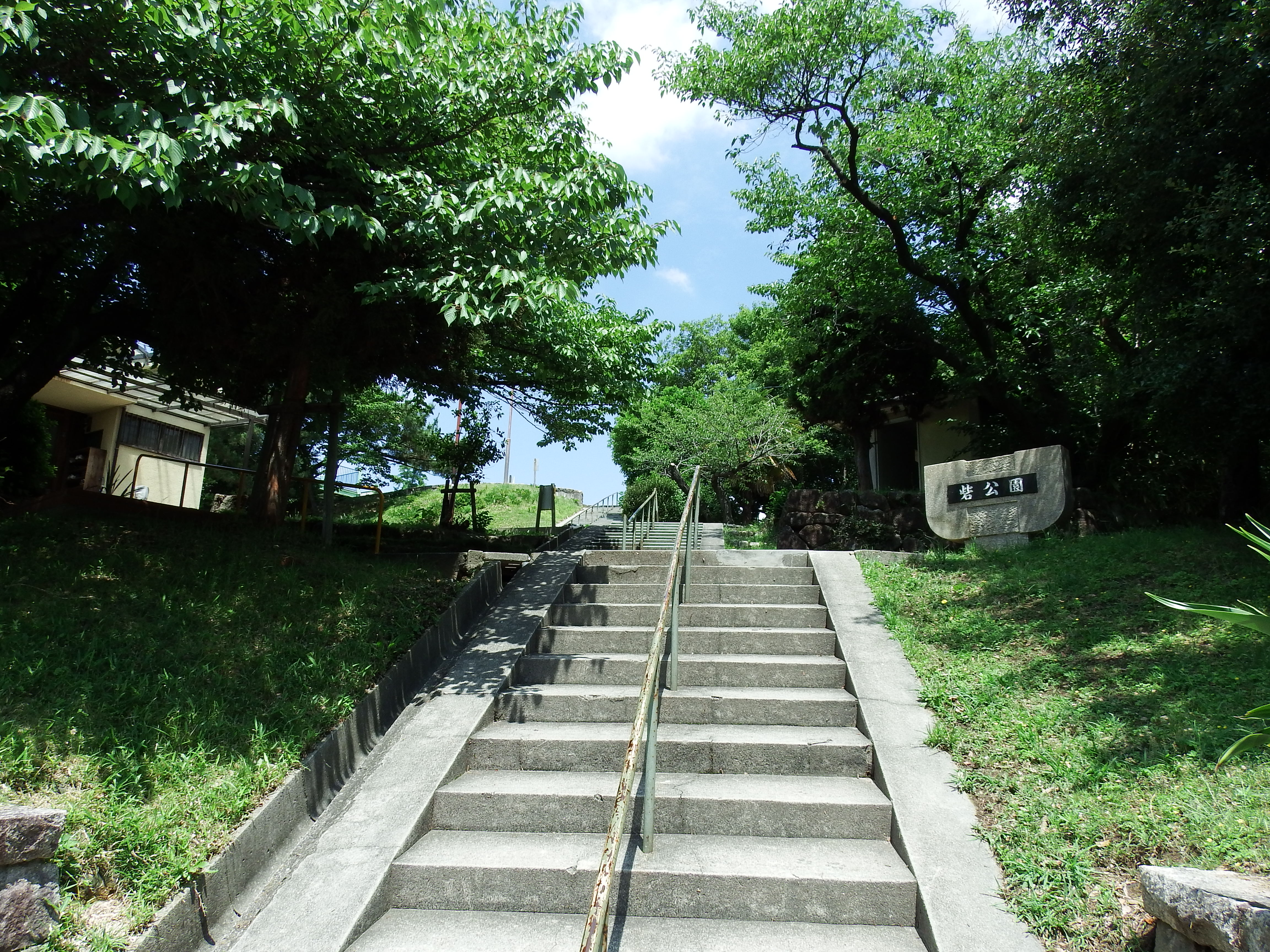 善照寺砦入口